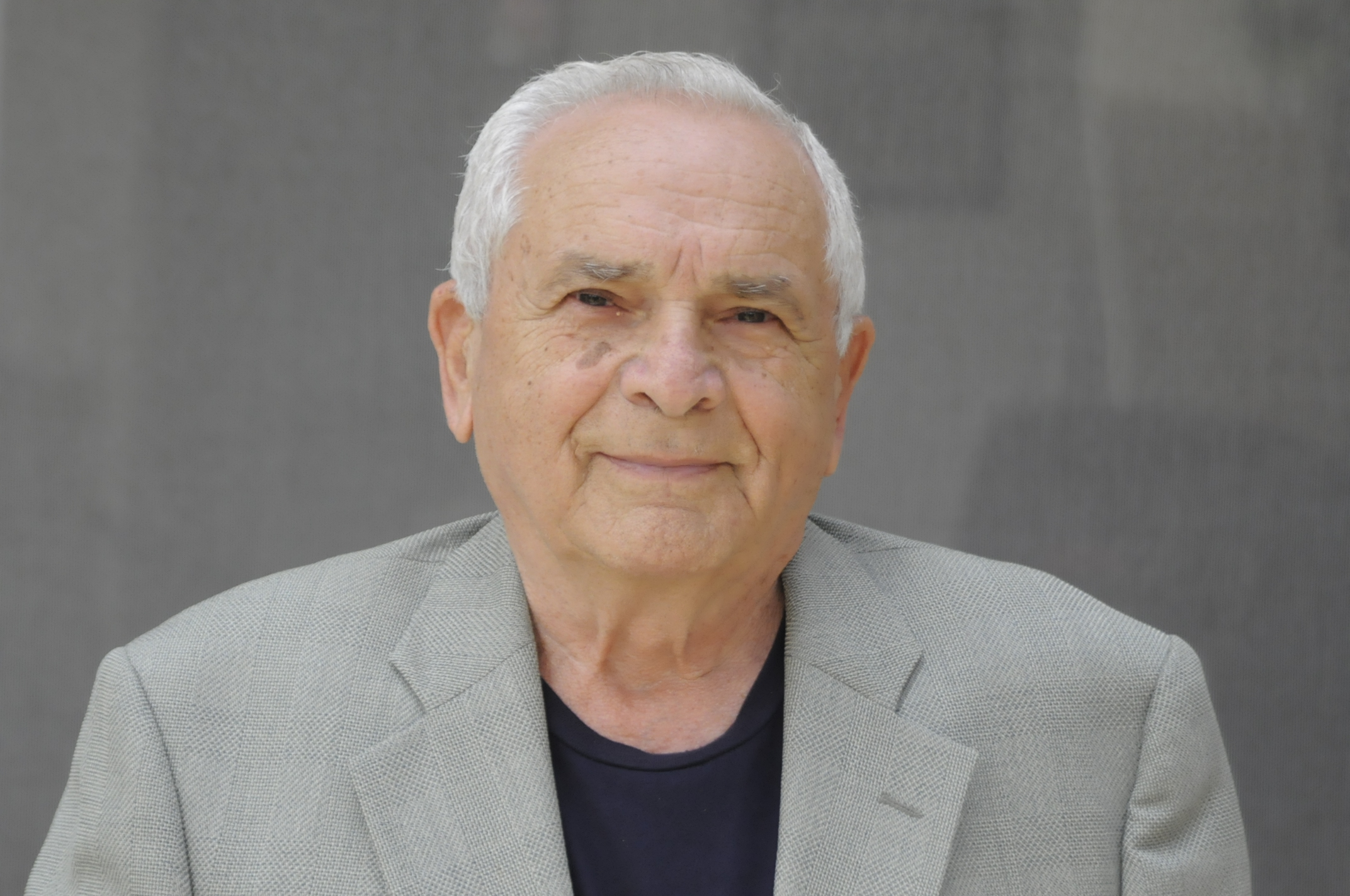 פרופ' יצחק קשתי